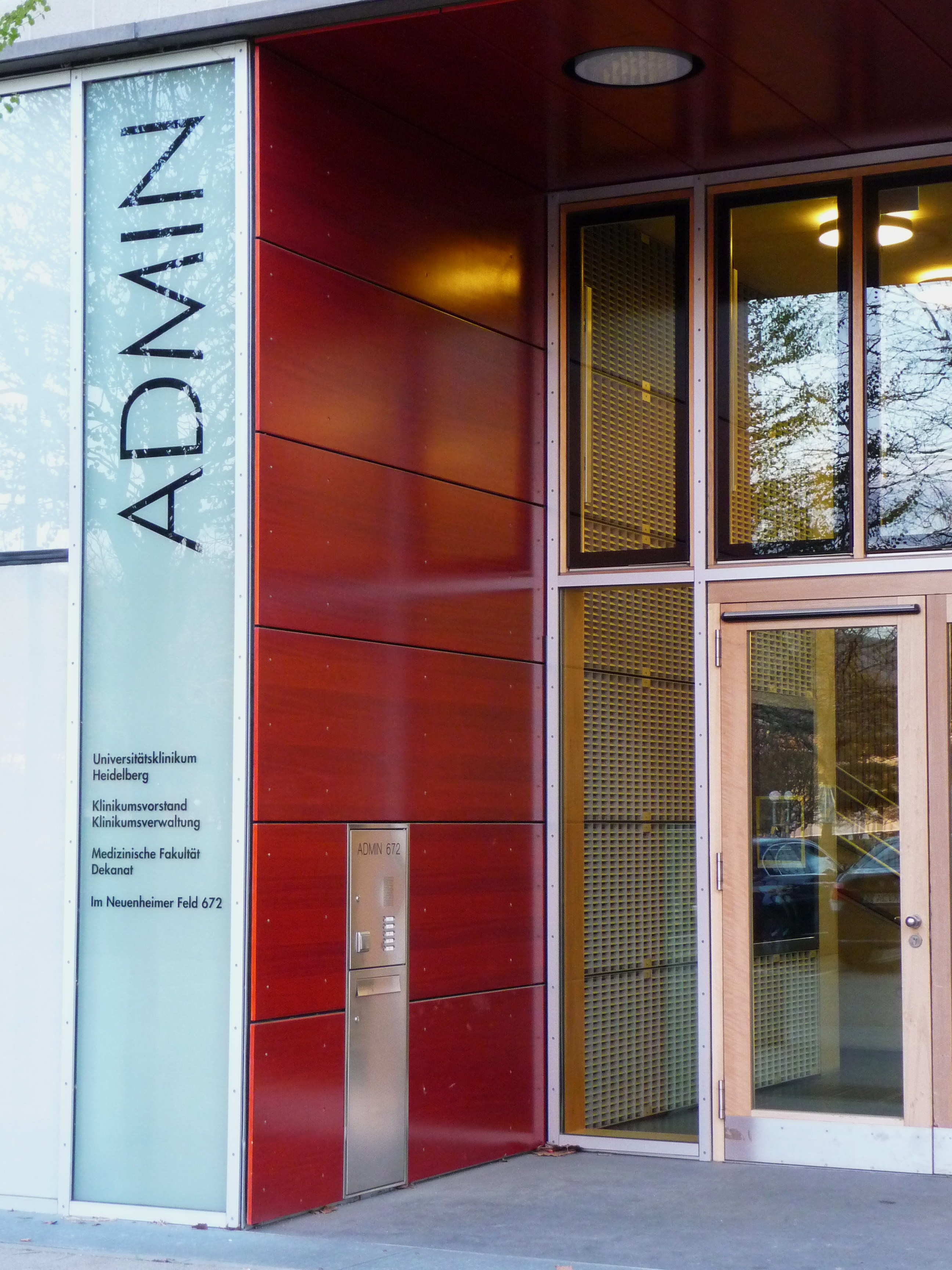 Verwaltungsgebäude "ADMIN" des Universitätsklinikums Heidelberg - Klinikvorstand, Klinikumsverwaltung, Medizinische Fakulatät Dekanat - im Neuenheimer Feld in Heidelberg (Baden-Württemberg, Deutschland)